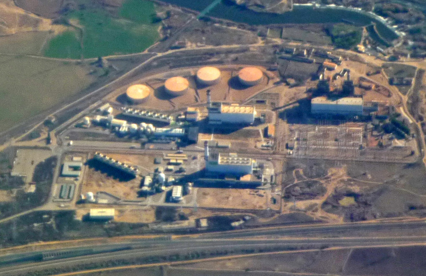 Central térmica de Aceca en Villaseca de la Sagra (España).